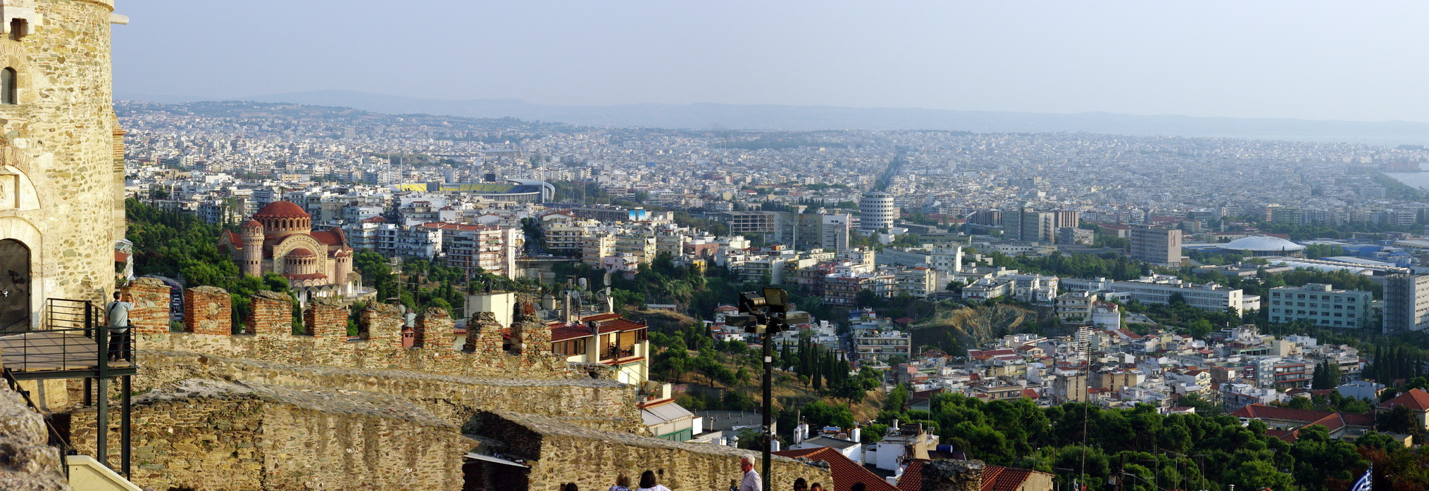 Panorama Thessaloniki, Blick von der Stadtmauer beim Trigonios-Turm